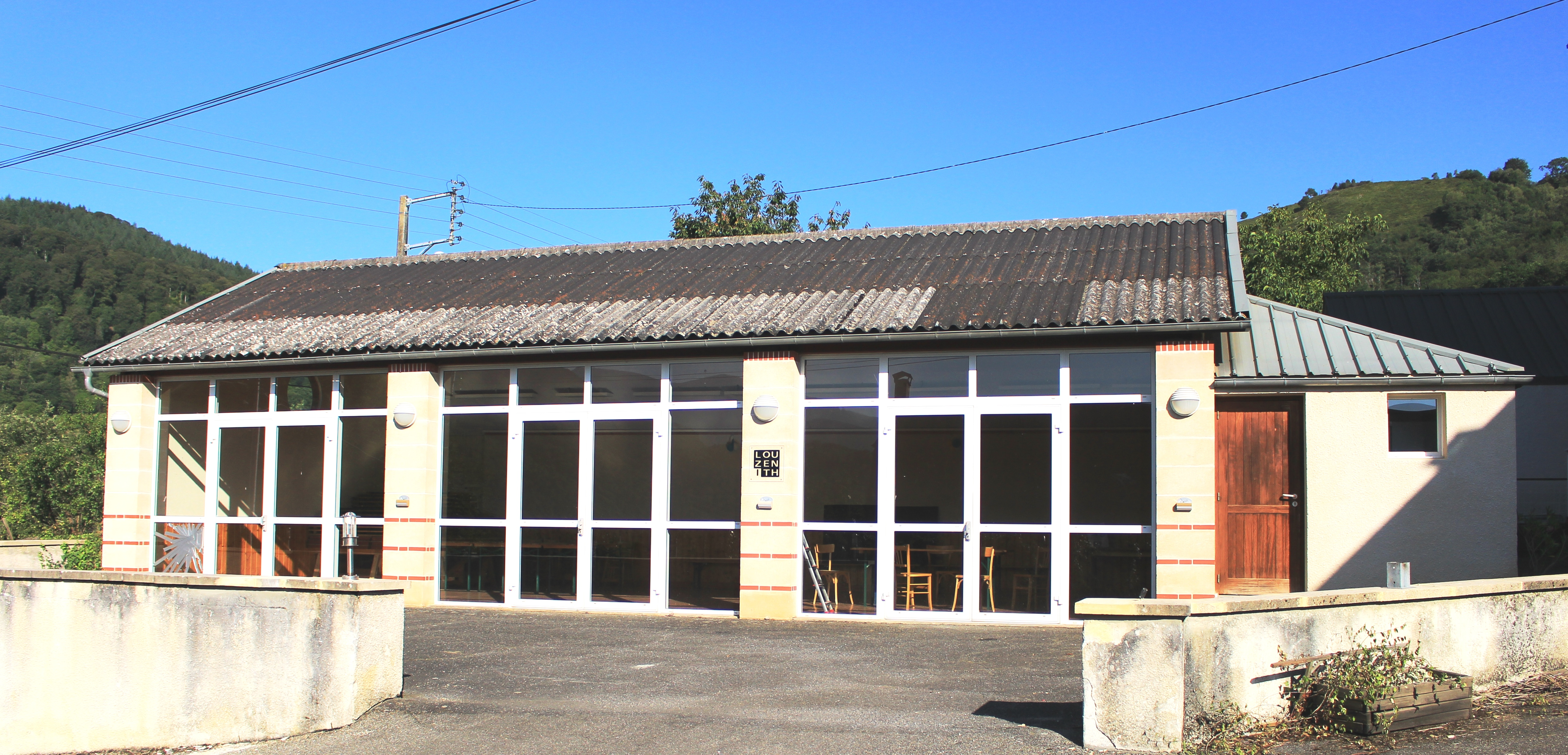 Salle des fêtes de Marsas (Hautes-Pyrénées)